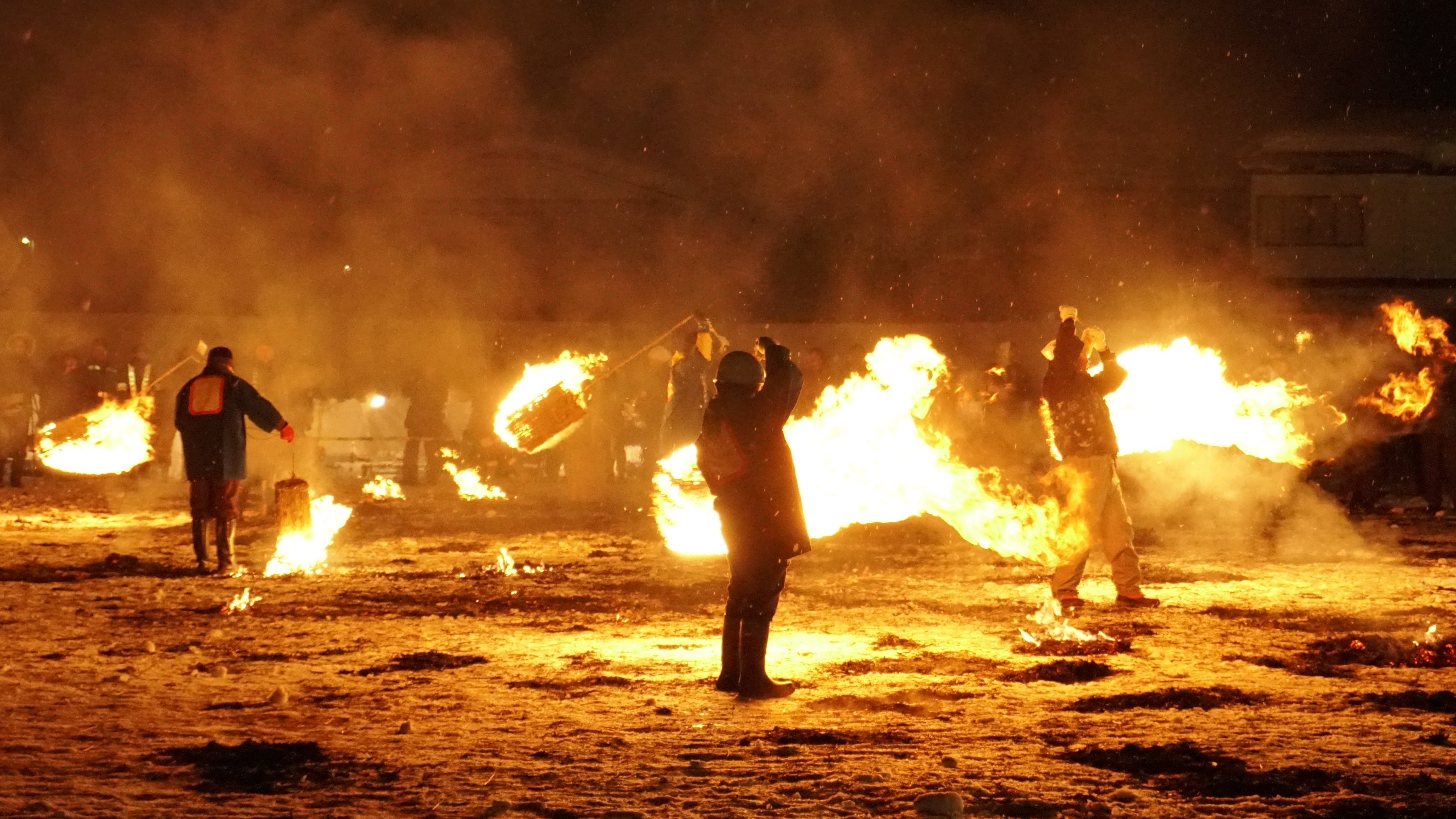 秋田県仙北市角館町で行われる小正月行事・火振りかまくら。着火した炭俵を振り回すことで次第に火が大きくなっていく。豪快かつ幻想的な祭りである。